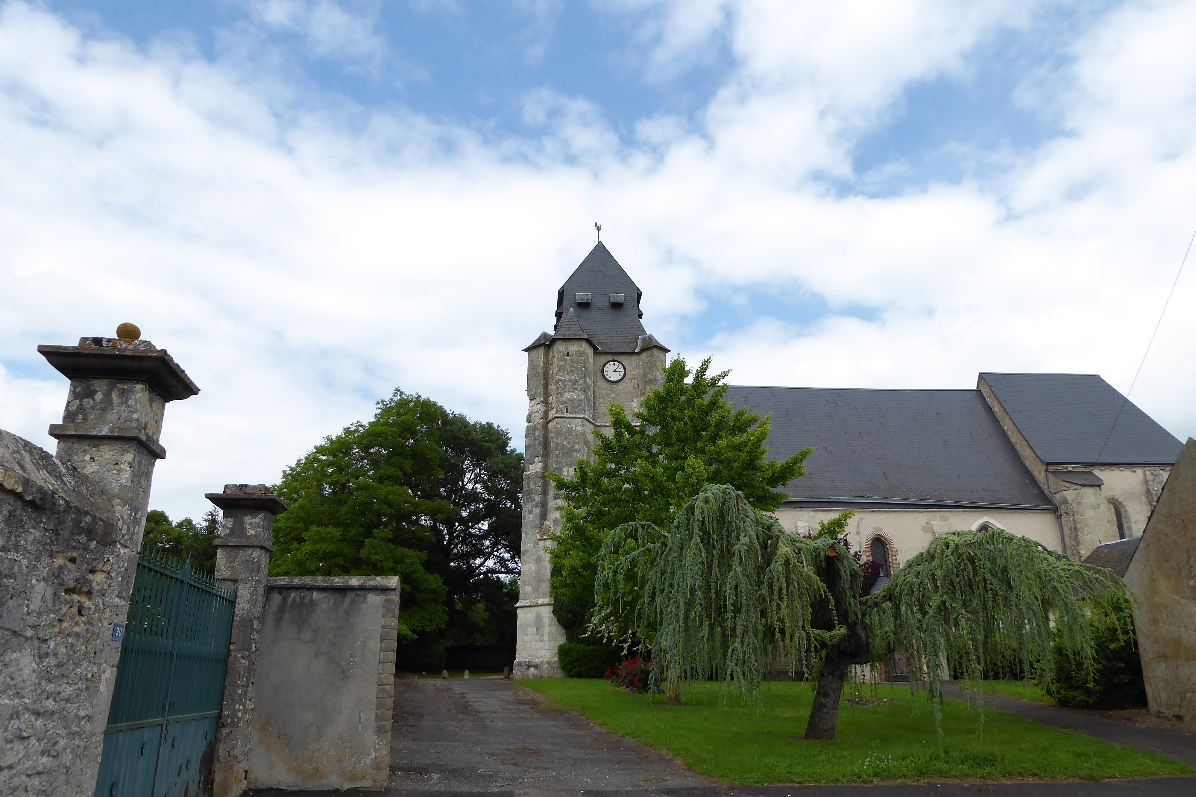 église Saint-Pierre, Lumeau, Eure-et-Loir, France.